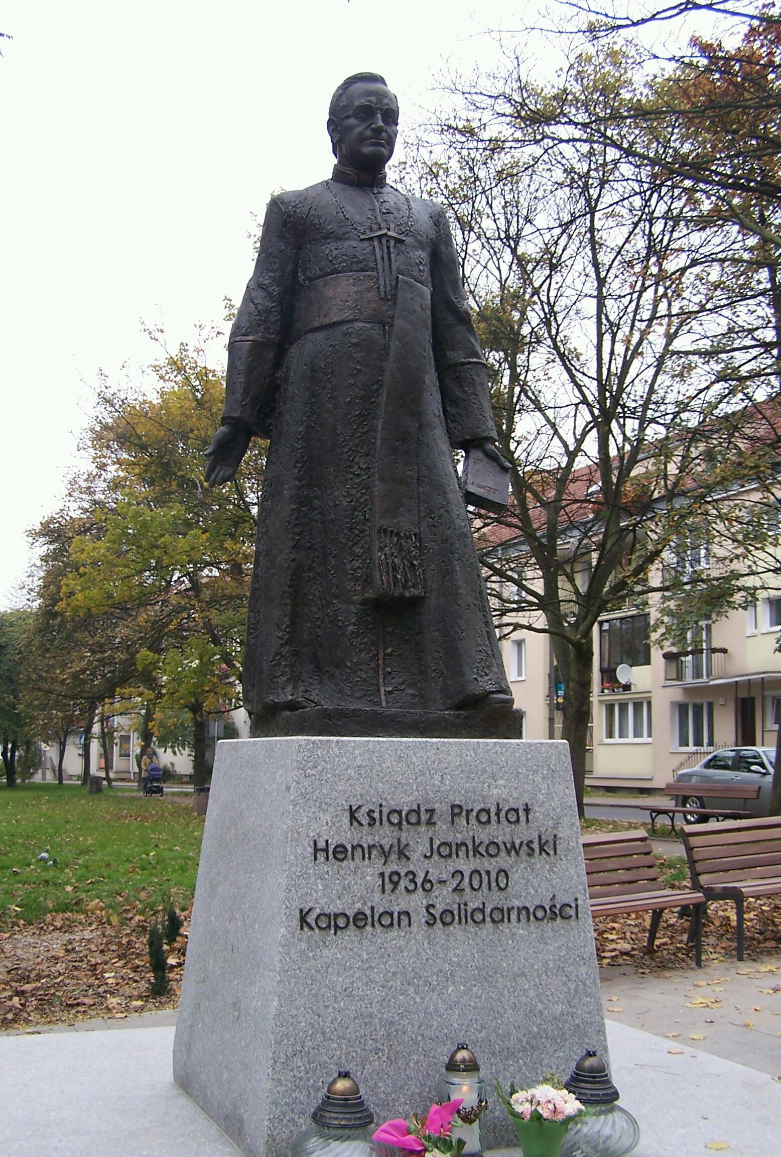 Pomnik ks. Henryka Jankowskiego w Gdańsku, autor Gennadij Jerszow.